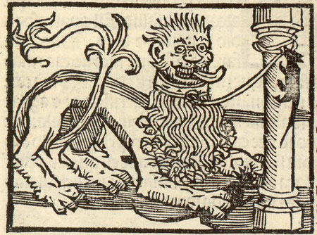 Le lio et le rat. Illustration dans l'édition de Steinhowel, Seville, 1521. Library of Congress